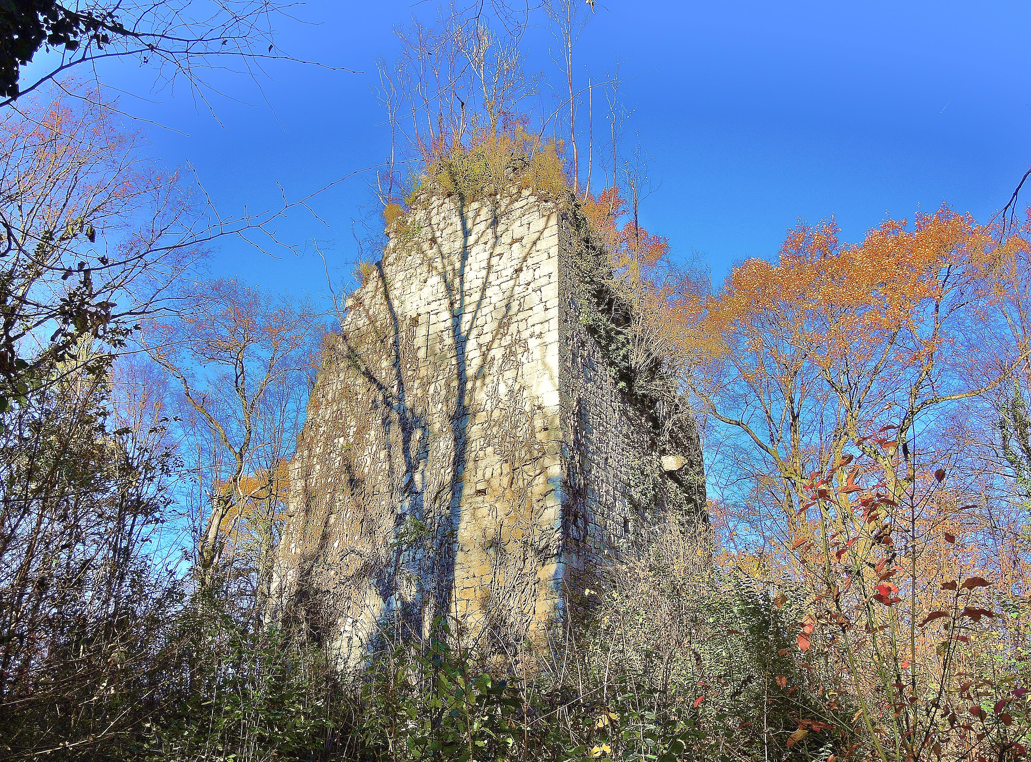 Vue Sud de la tour médiévale de Châtelot. Département du Doubs. France.